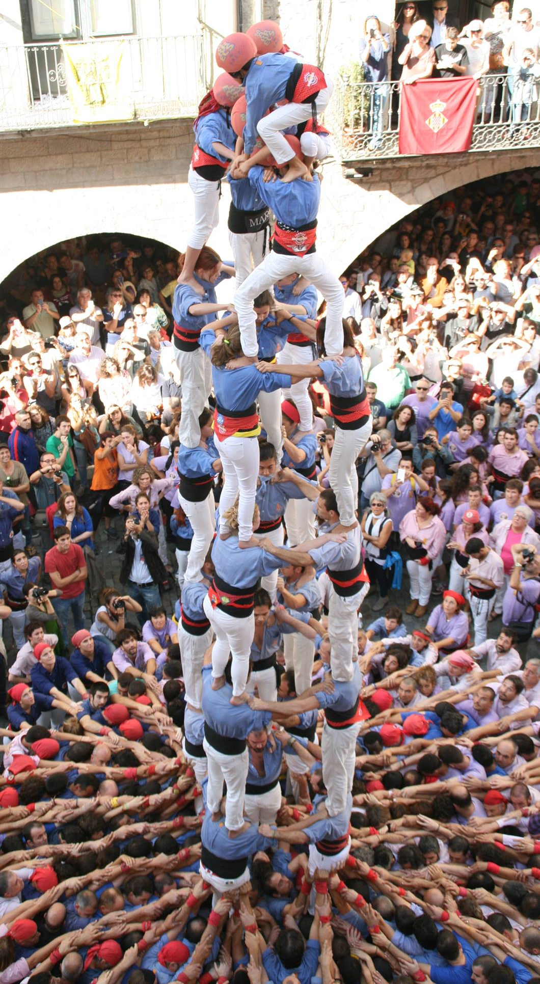 Primer 5 de 8 carregat pels Marrecs de Salt el 26 d'octubre del 2014 a plaça del vi per la diada de Sant Narcís.